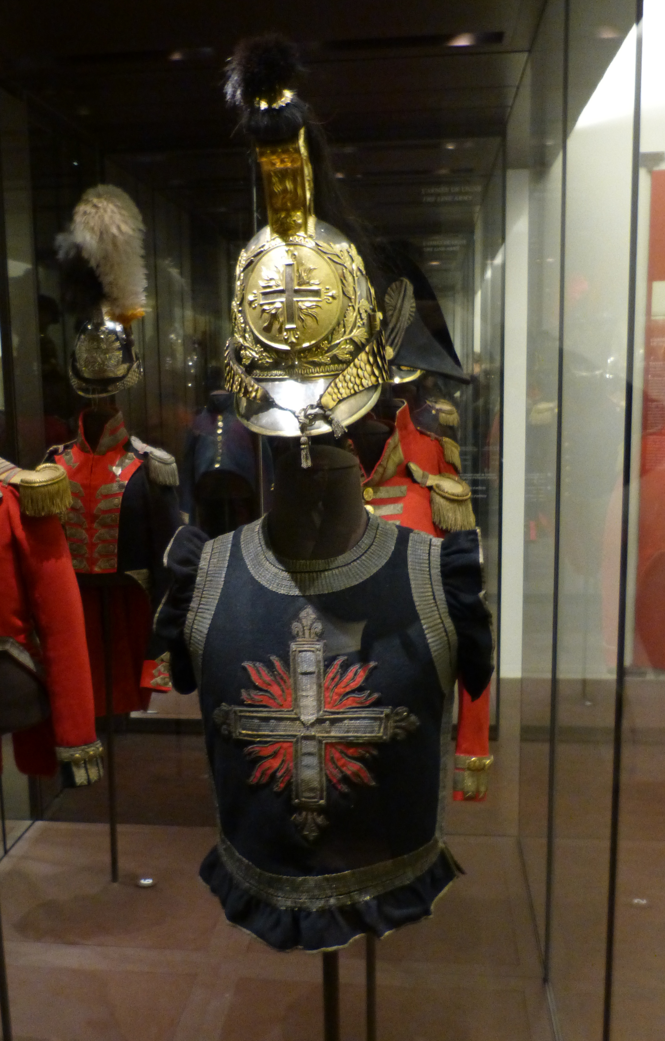 Uniform grauer Musketer (2. Kompanie), 1814–1815